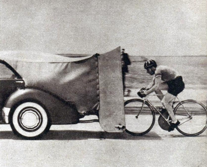 L'Américain Albert Marquet le 12 avril 1937 à Los Angeles, recordman mondial de vitesse à vélo sur le plat derrière abri (139,902 km/h, aspiré par une voiture).